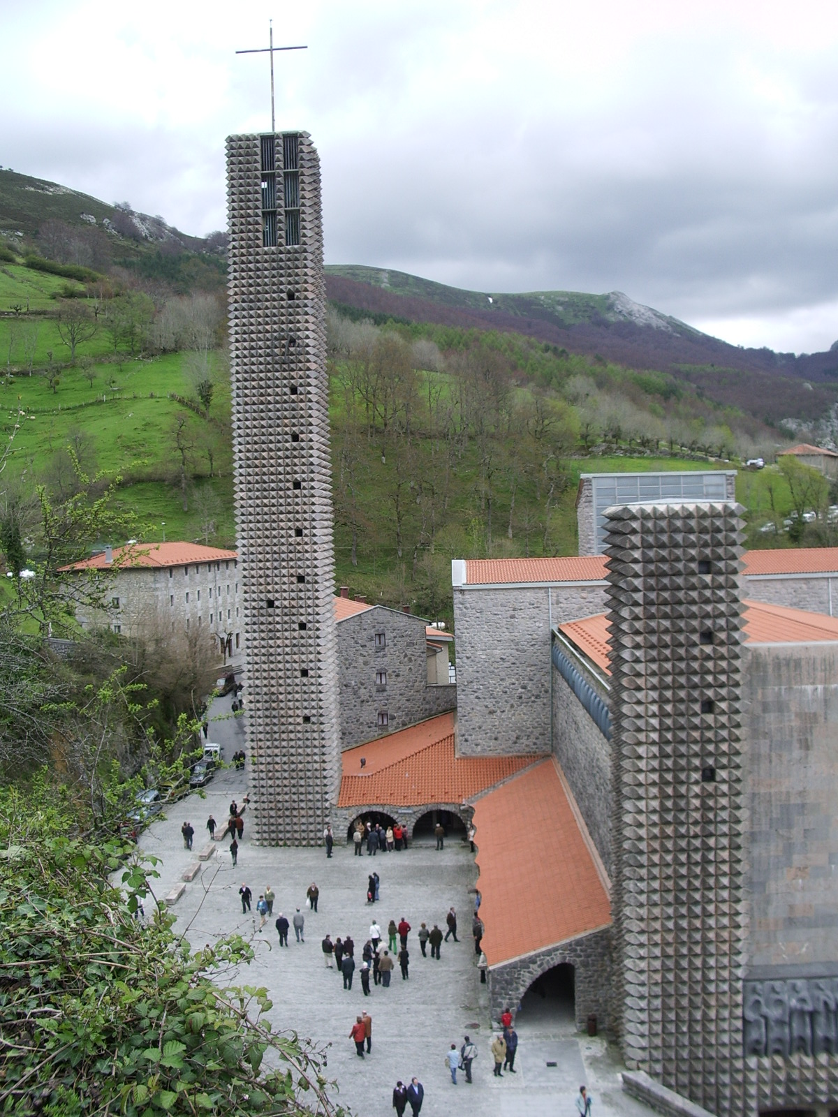 Irudia/Image: Arantzazu santutegia, Oñati, Gipuzkoa Egilea/Author: Josu Goñi Etxabe